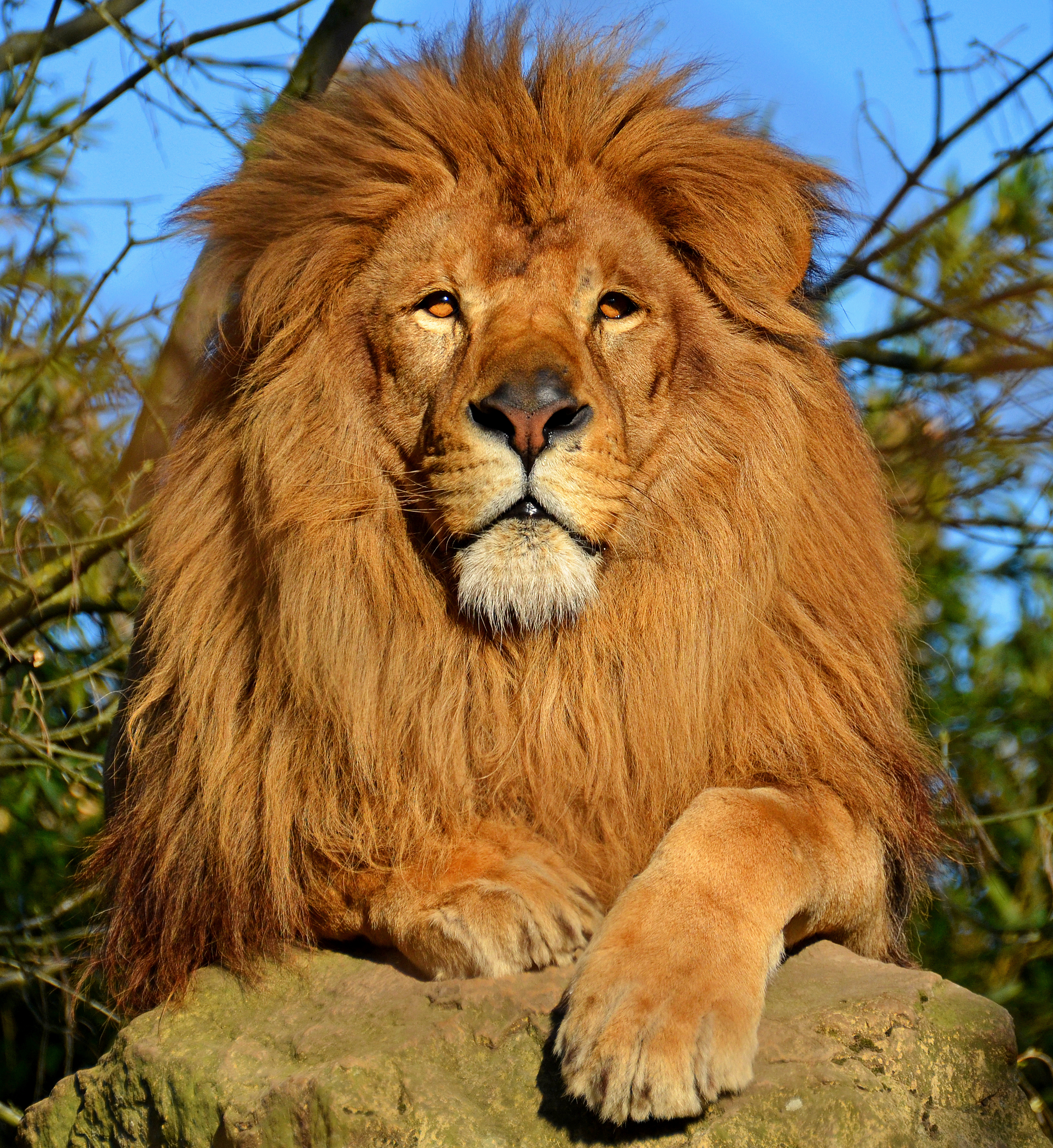 أسدٌ أفريقيّ